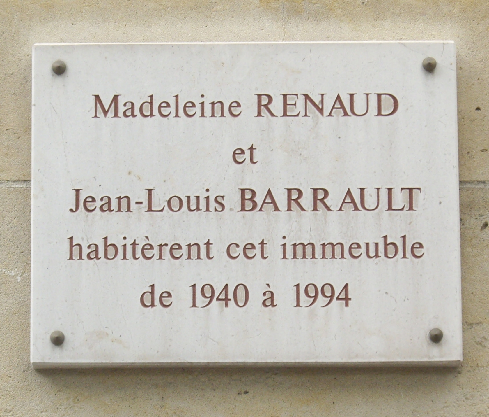 Plaque commémorative, 18 avenue du Président-Wilson, Paris 16e. « Madeleine Renaud et Jean-Louis Barrault habitèrent cet immeuble de 1940 à 1994. »